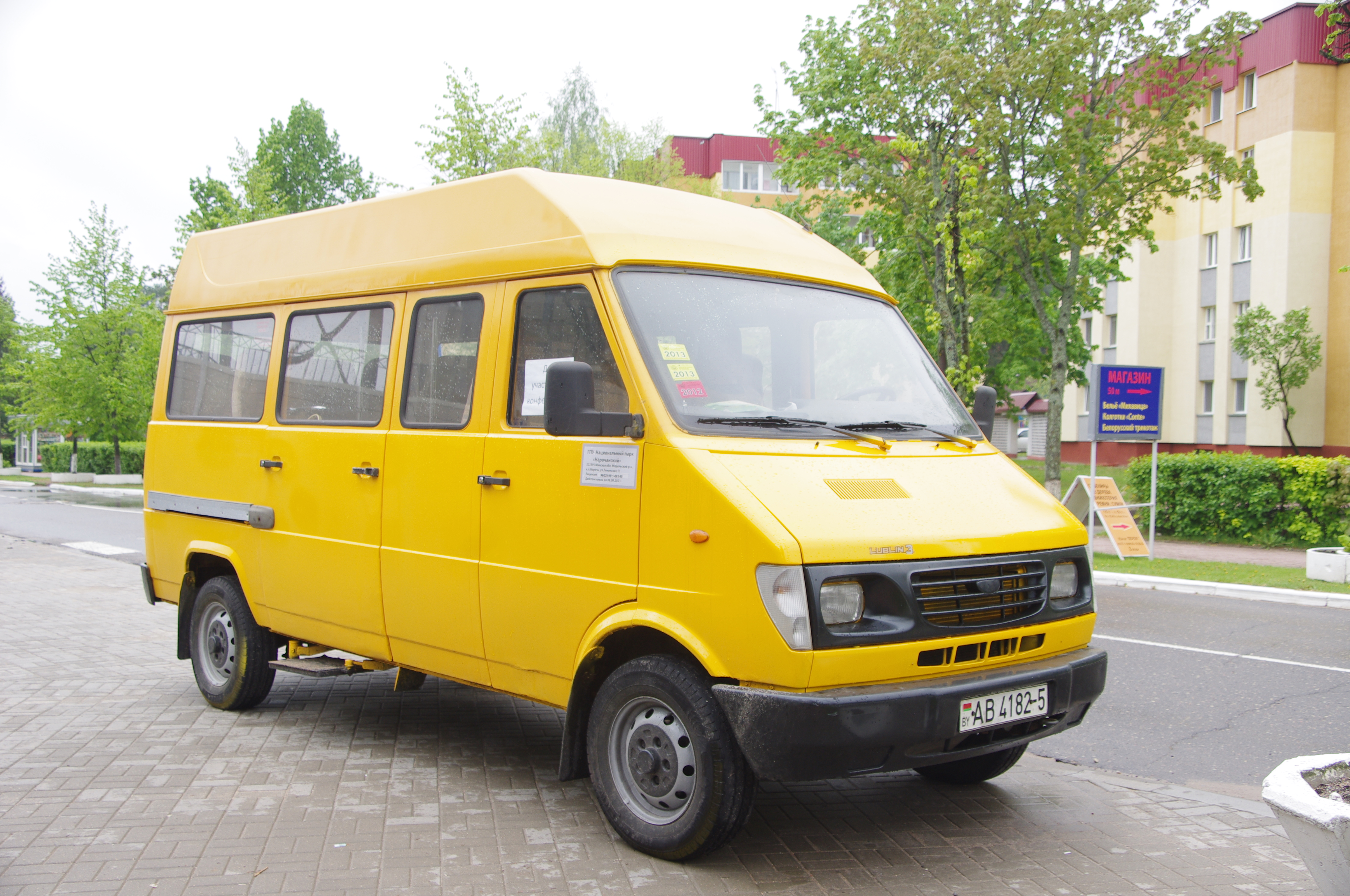 Belarus, Naroch